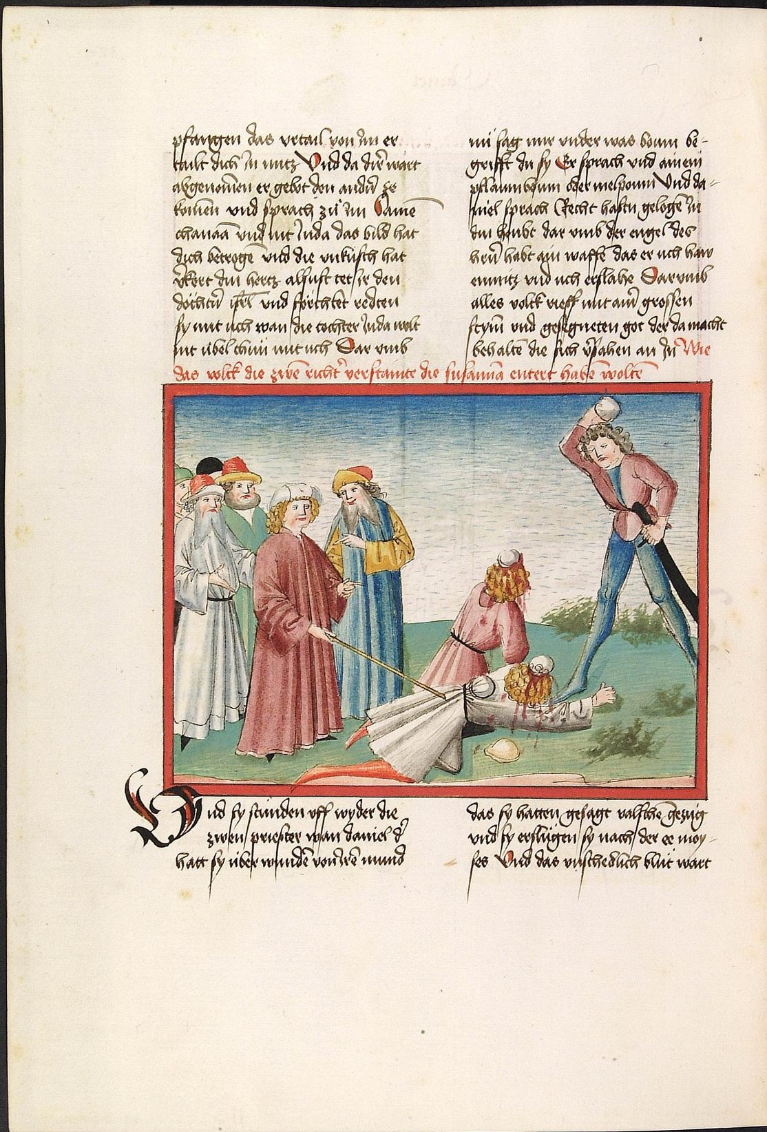 Codex Palatinus germanicus 18, Blatt 329v - Bibel, Altes Testament, Buch Daniel: Ein Henker steinigt die zwei bereits am Boden knienden und blutenden Alten. Daneben stehen die Richter im Gespräch, einer streckt seinen Stab zu einem der Alten hin aus. (Cpg 18 = Bibel AT, deutsch: Psalter, Parabole, Ecclesiastes, Cantica canticorum, Sapienta, Ecclesiasticus, Propheten)